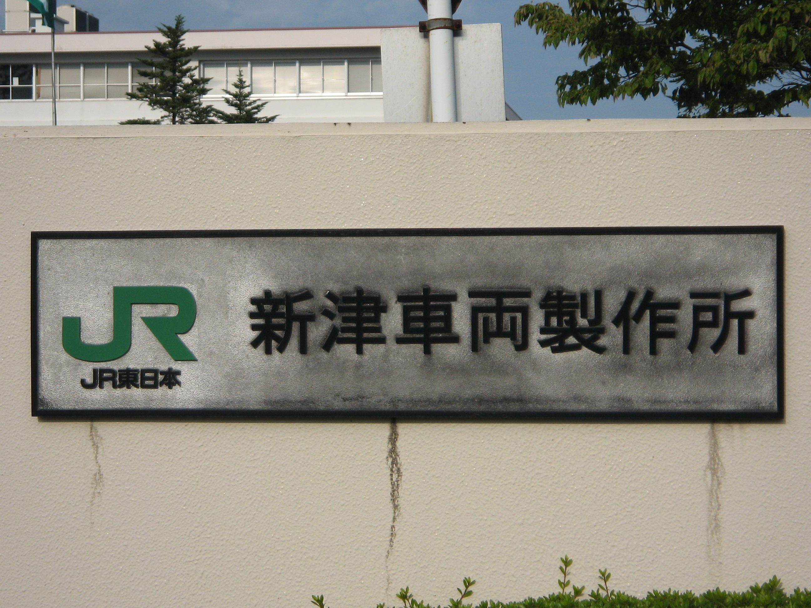 JR東日本 新津車両製作所